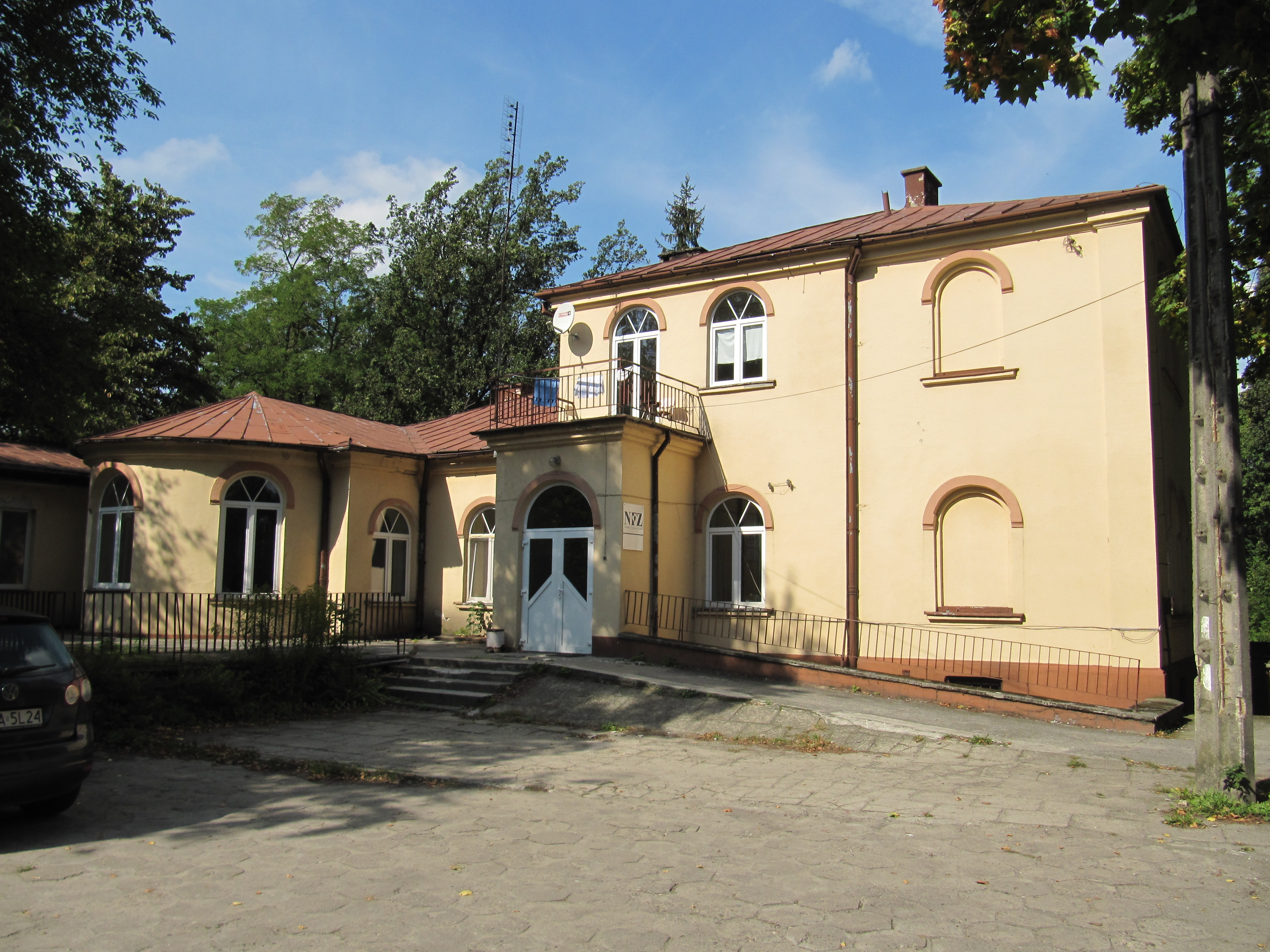 Pławno, ul. Radomszczańska 19 - dwór (dec. pałac), obecnie szpital (zabytek nr rejestr. 10/45)